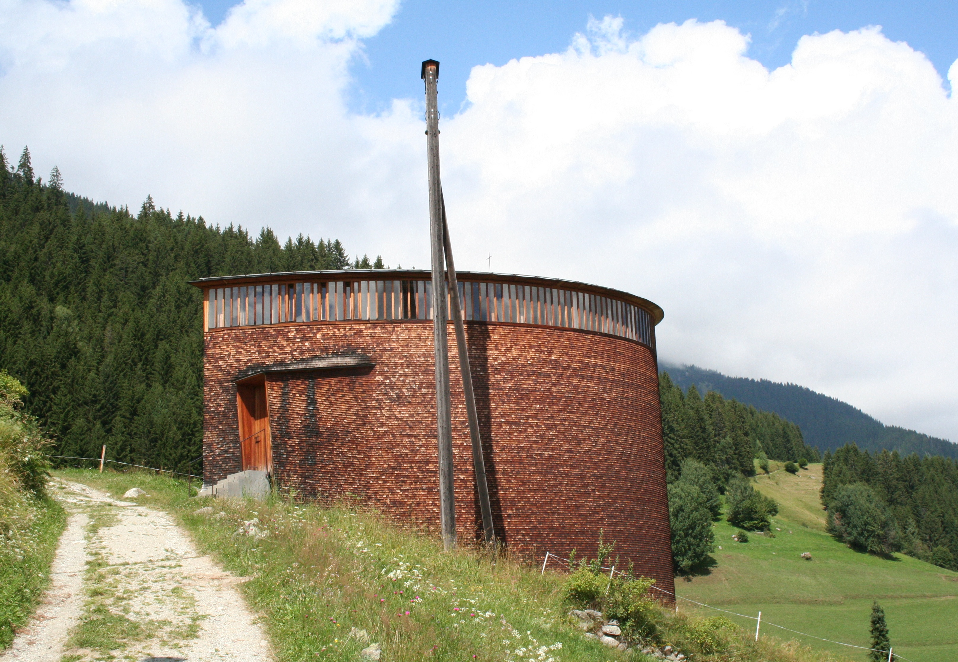 Kirche Sogn Benedetg oberhalb Sumvitg